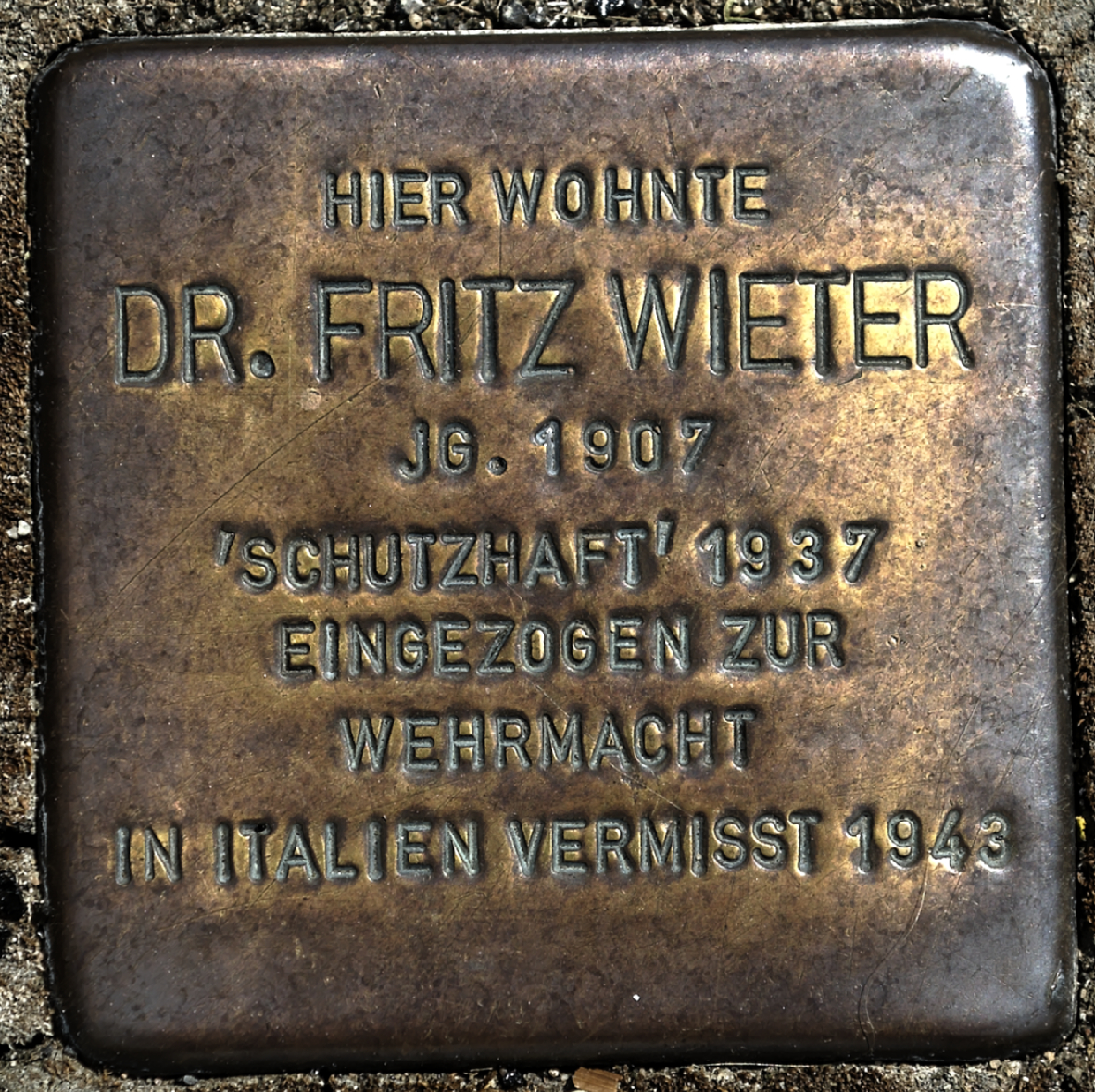 Stolpersteine in Solingen